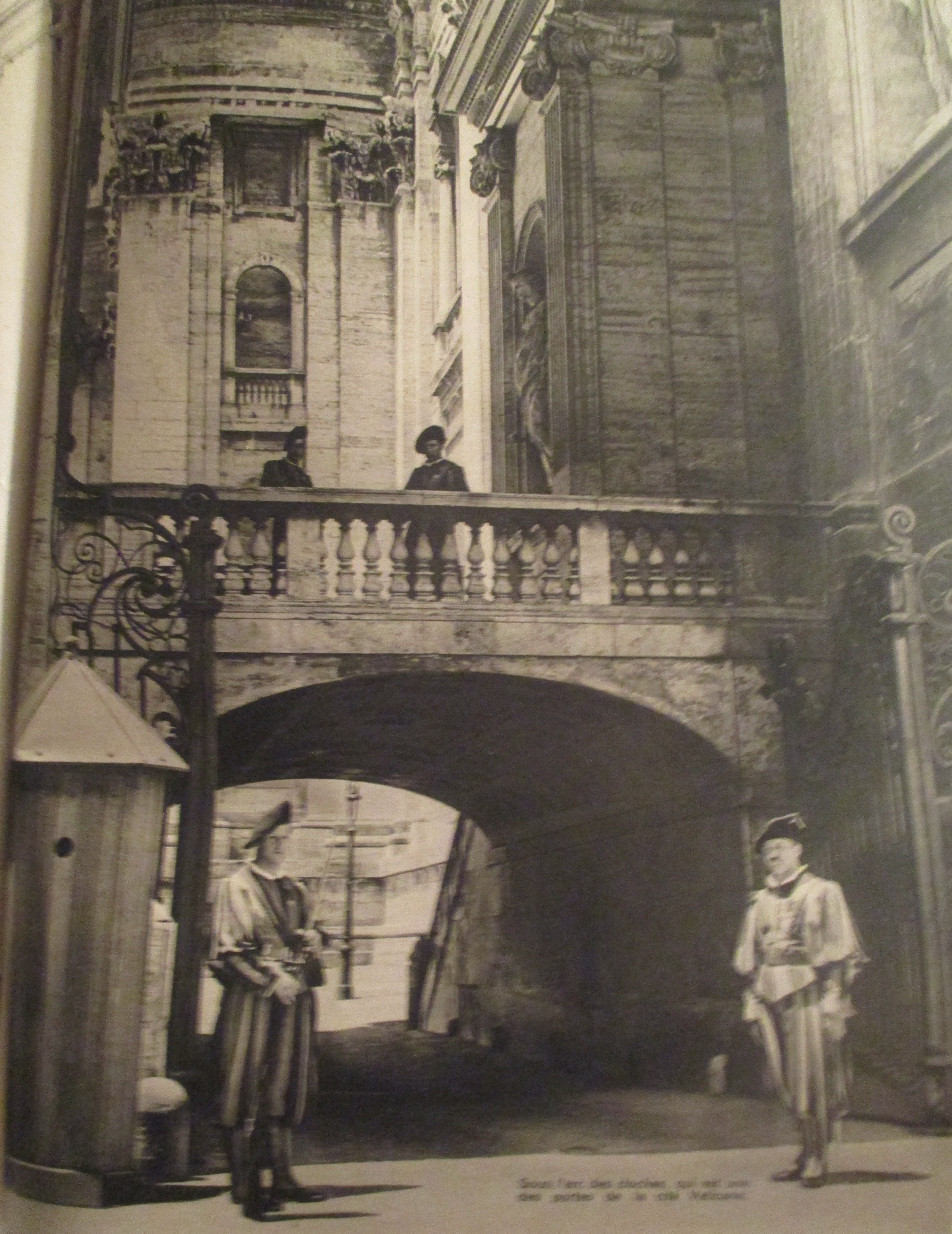 Gardes suisses en 1939 au Vatican, photographie parue dans le numéro hors série de février 1939 de L'Illustration, consacré à la mort de Pie XI.